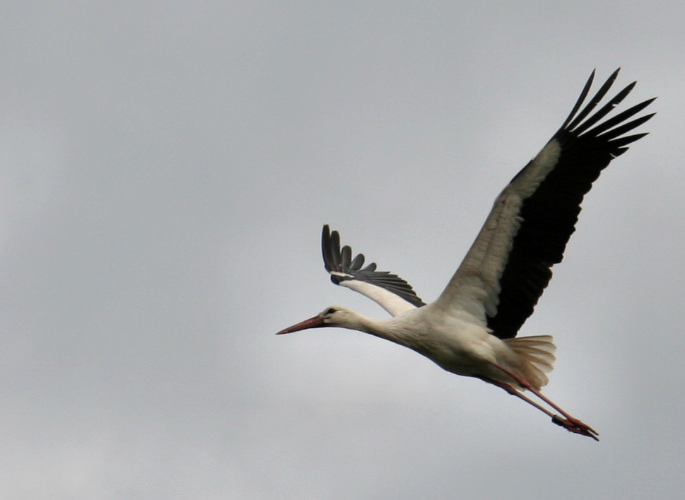 Ciconia ciconia